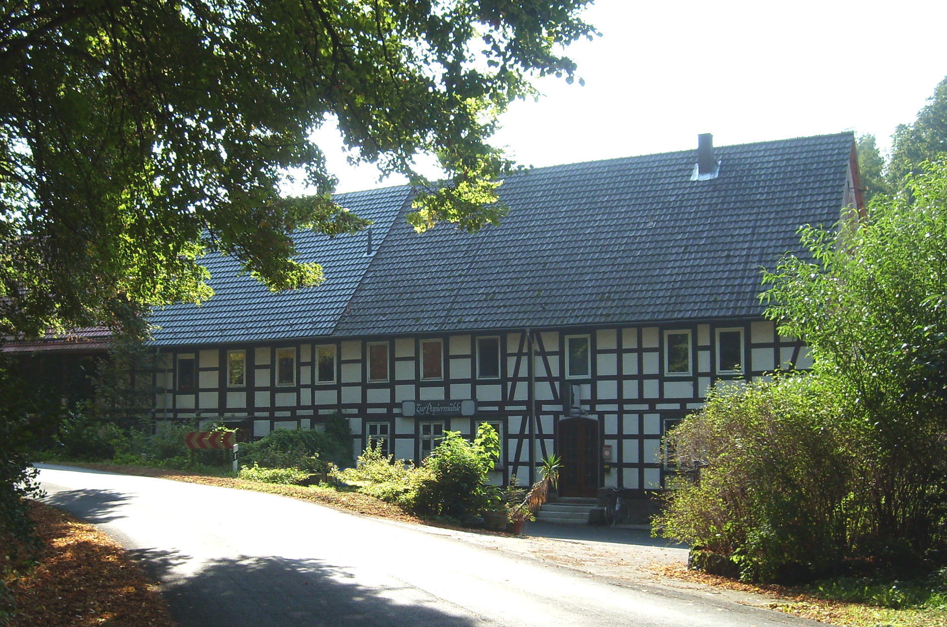 Papiermühle Eberhausen. September 2008.